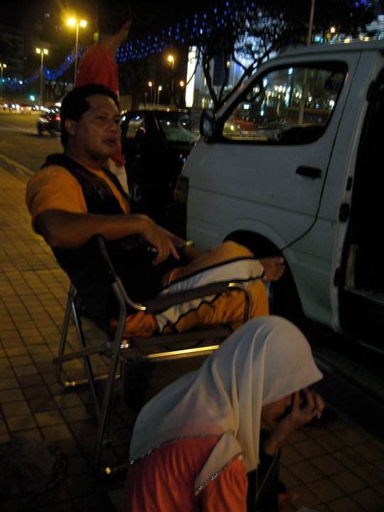 Sewaktu mengarah drama.